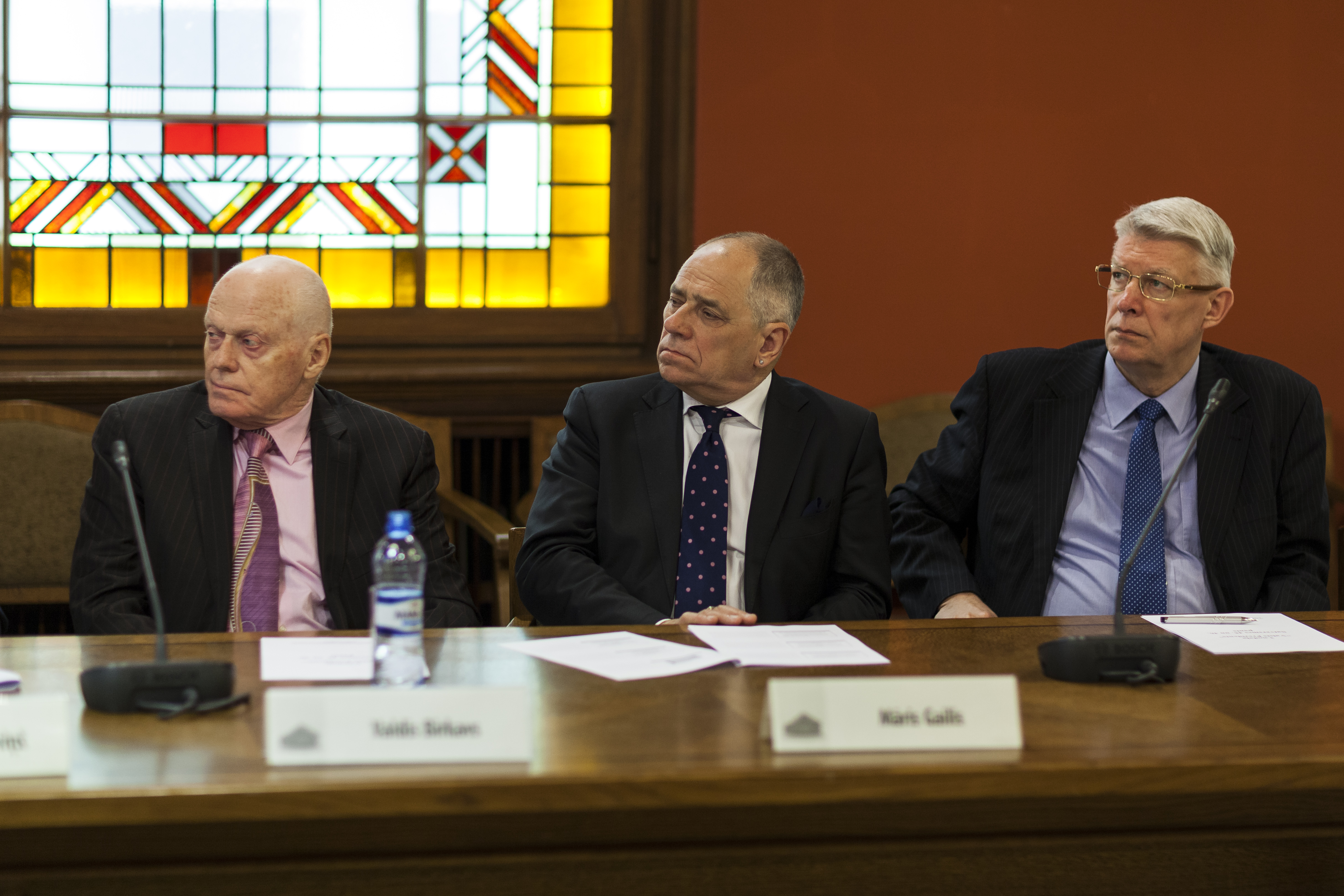 2016.gada 12.aprīlis. Juridiskās komisijas darba grupas Valsts prezidenta pilnvaru iespējamai paplašināšanai un ievēlēšanas kārtības izvērtēšanai sēde. Foto: Reinis Inkēns, Saeimas Administrācija Izmantošanas noteikumi: saeima.lv/lv/autortiesibas